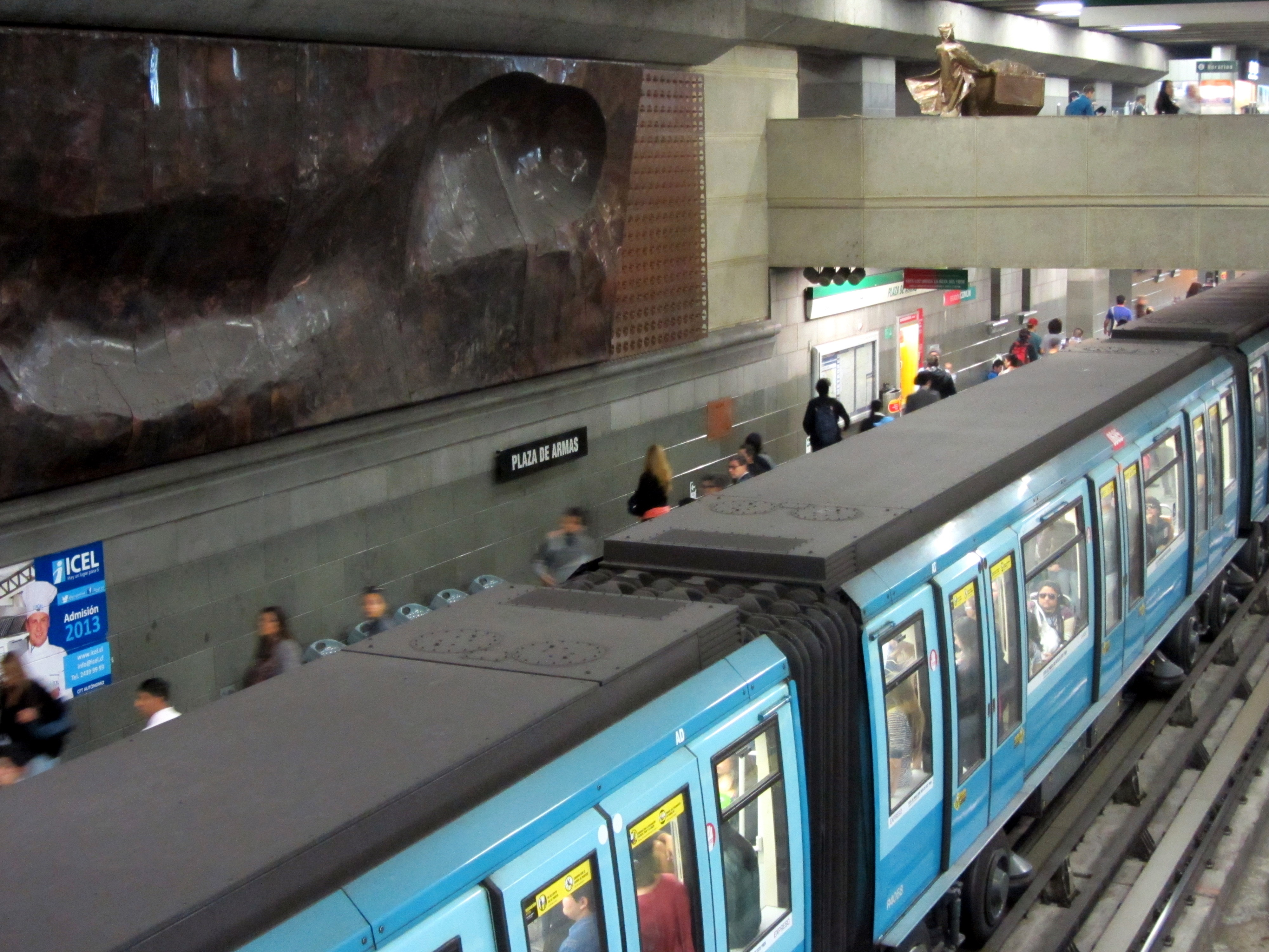 Mural escultórico en cobre (24 metros de largo por 3 de alto), obra de la escultora chilena Elisa Aguirre ubicada en el metro Plaza de Armas, Santiago de Chile. Arriba a la derecha se ve parte de la escultura en cobre de Hernán Puelma El pionero.